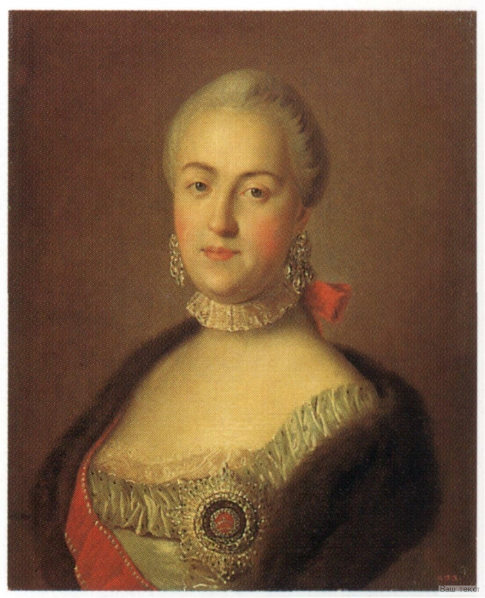 Портрет великой княгини Екатерины Алексеевны Холст, масло. 58,5 х 47,5 На подрамнике наклейки с надписями чернилами: 283. Князя Лобанова-Ростовского; № 81 500 р. Оц. Негри и красная сургучная печать судебного пристава; карандашом: № 1033; штамп: Г. Р. М. инв. № 433 (номер зачеркнут) Поступила: 1897 из собрания князя А. Б. Лобанова-Ростовского (Санкт-Петербург) Ж-5320 Изображена с орденом святой Екатерины Большого креста (лента и звезда). Технологическое исследование, прове¬денное в ГРМ в 1979, выявило, что лента и звезда переписаны (первоначально была голубая андреевская лента).